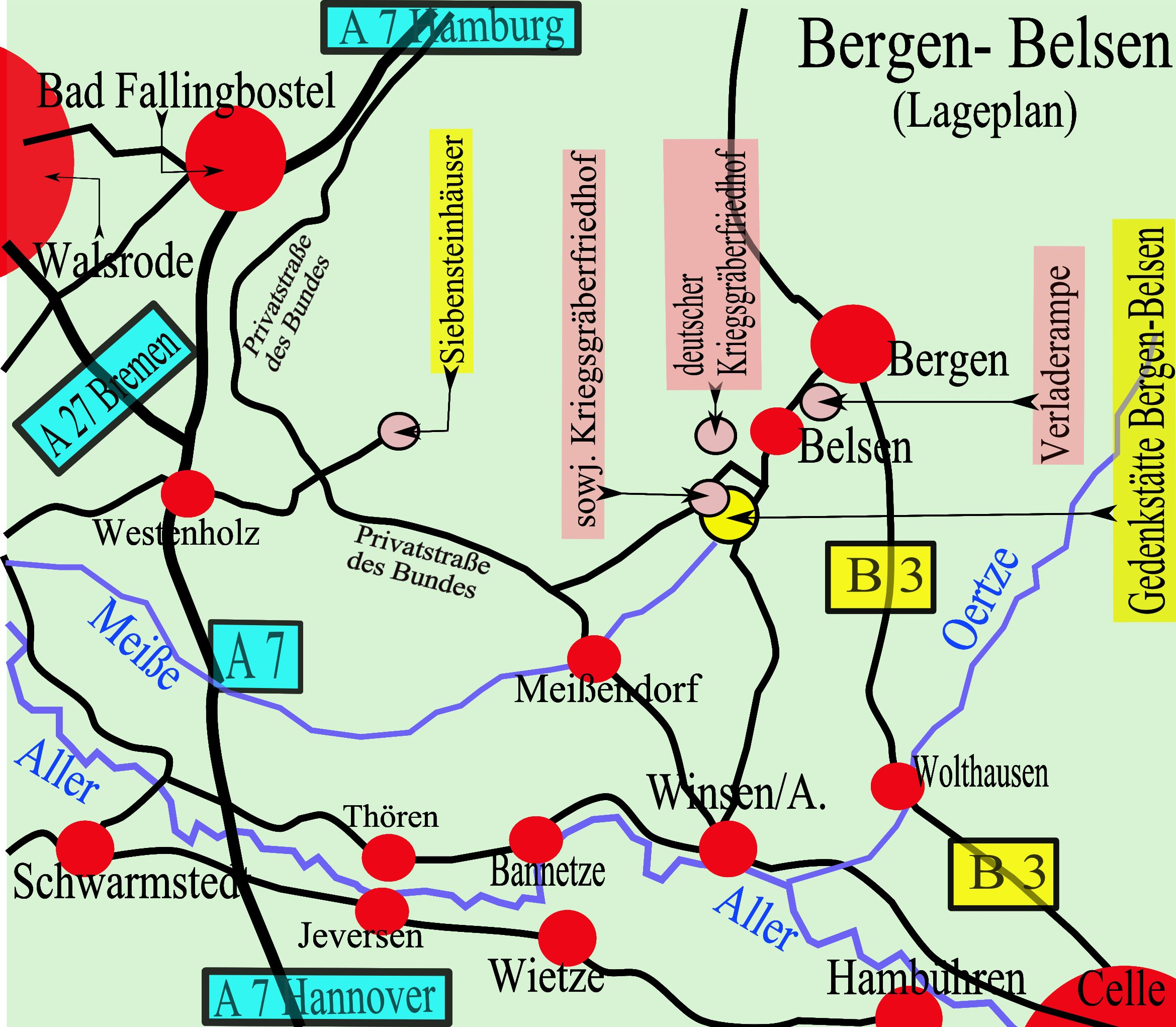 Lageplan von KZ-Gedenkstätte Bergen-Belsen, russ. und dt. Friedhöfen und Siebensteinhäusern